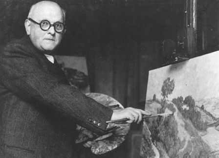 Portrait photographique de sibra vers 1946